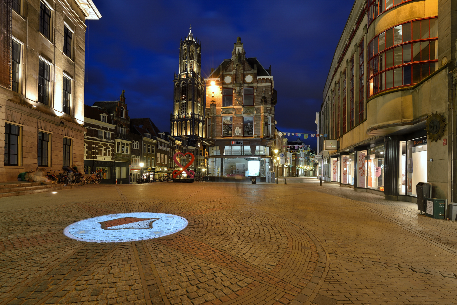 Dom in Utrecht